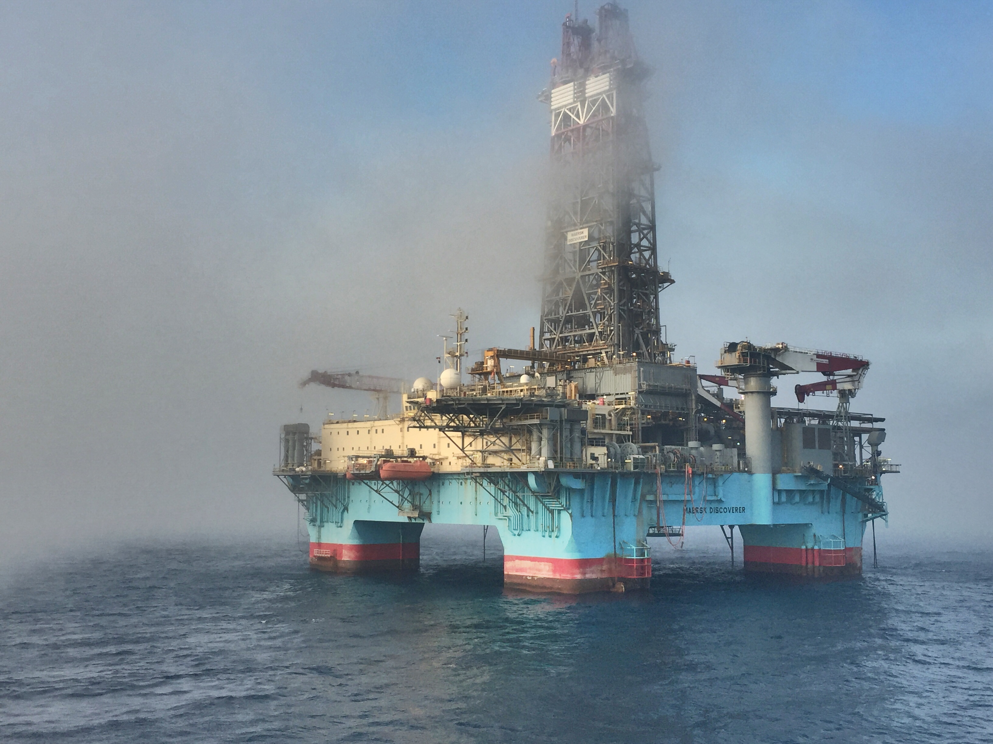 Offshore Egypt Mærsk Discoverer